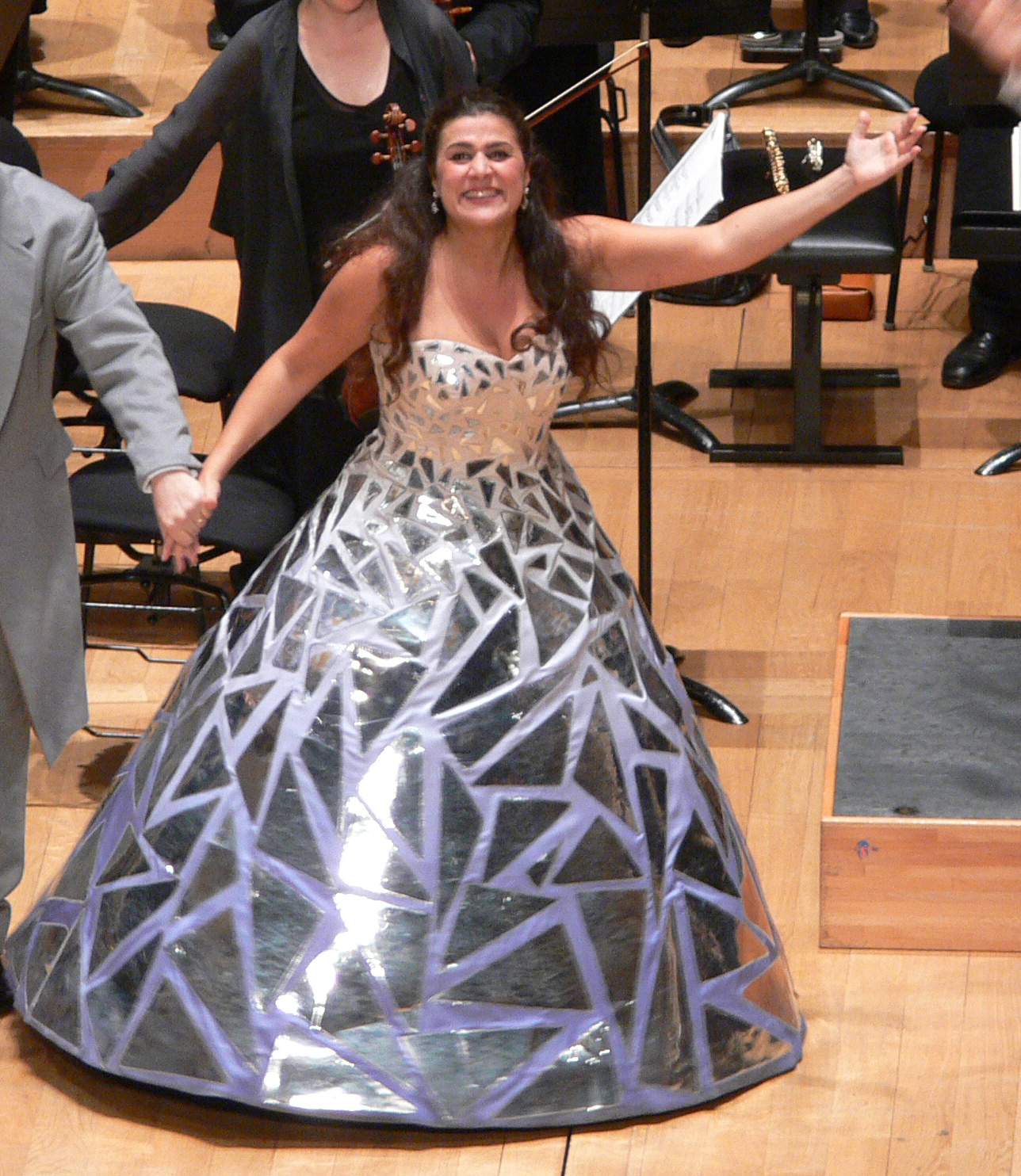 Cecilia Bartoli, after a concert performance of "La Cenerentola", Salle Pleyel, Paris